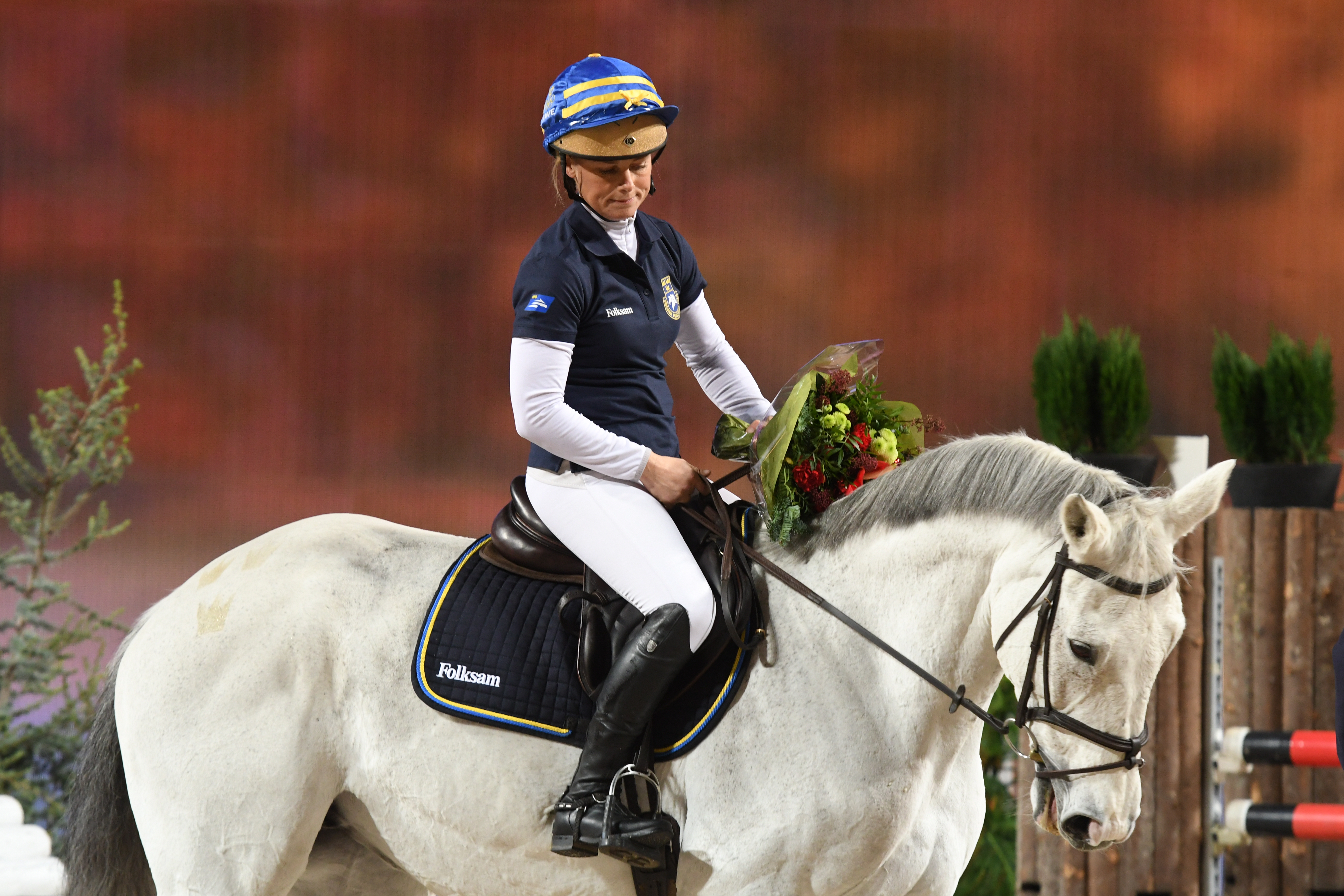 Sara Algotsson Ostholt på Wega under Sweden International Horse Show. Avtackning av Wega som slutar i landslaget.